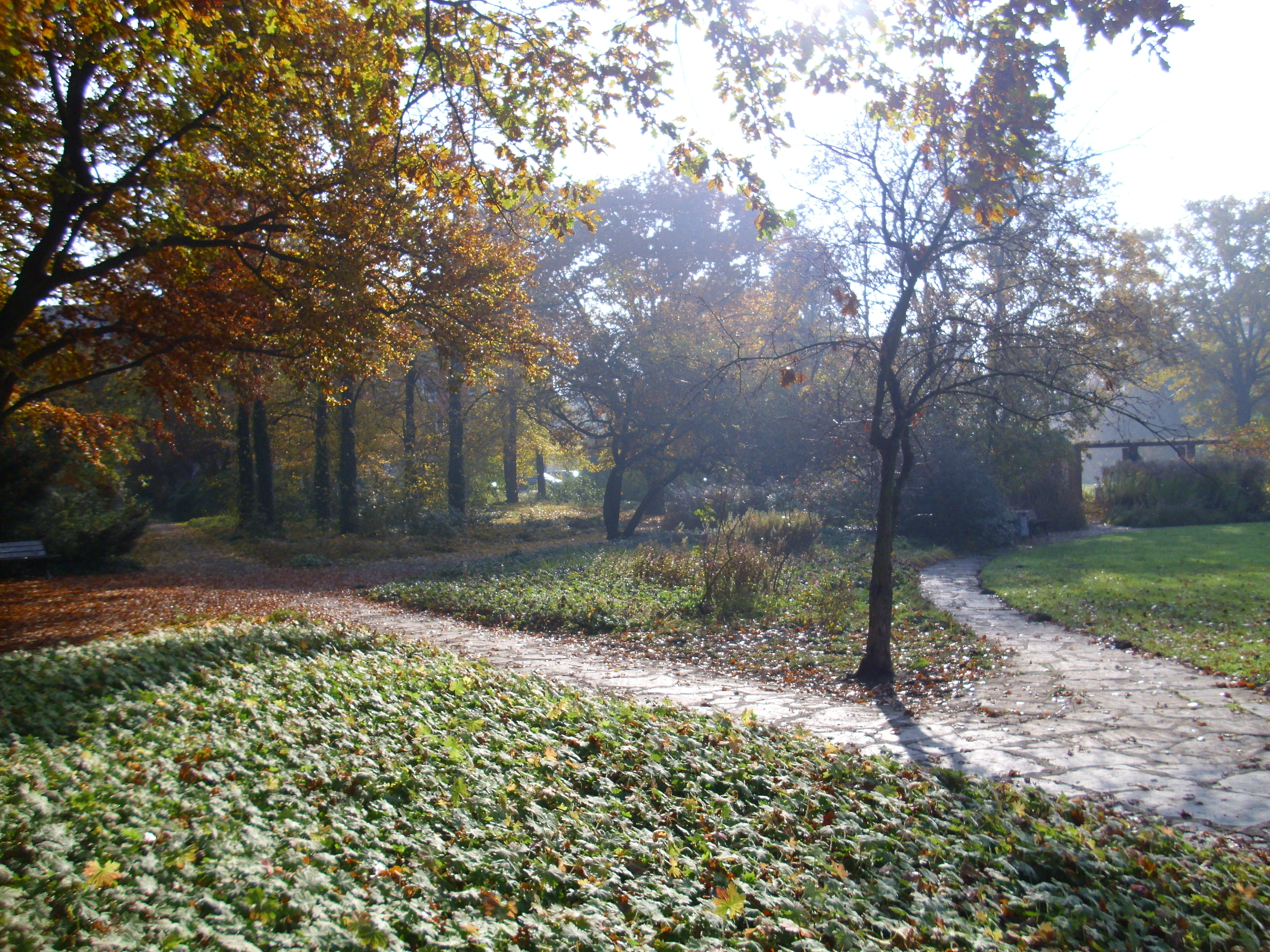 Blechenpark